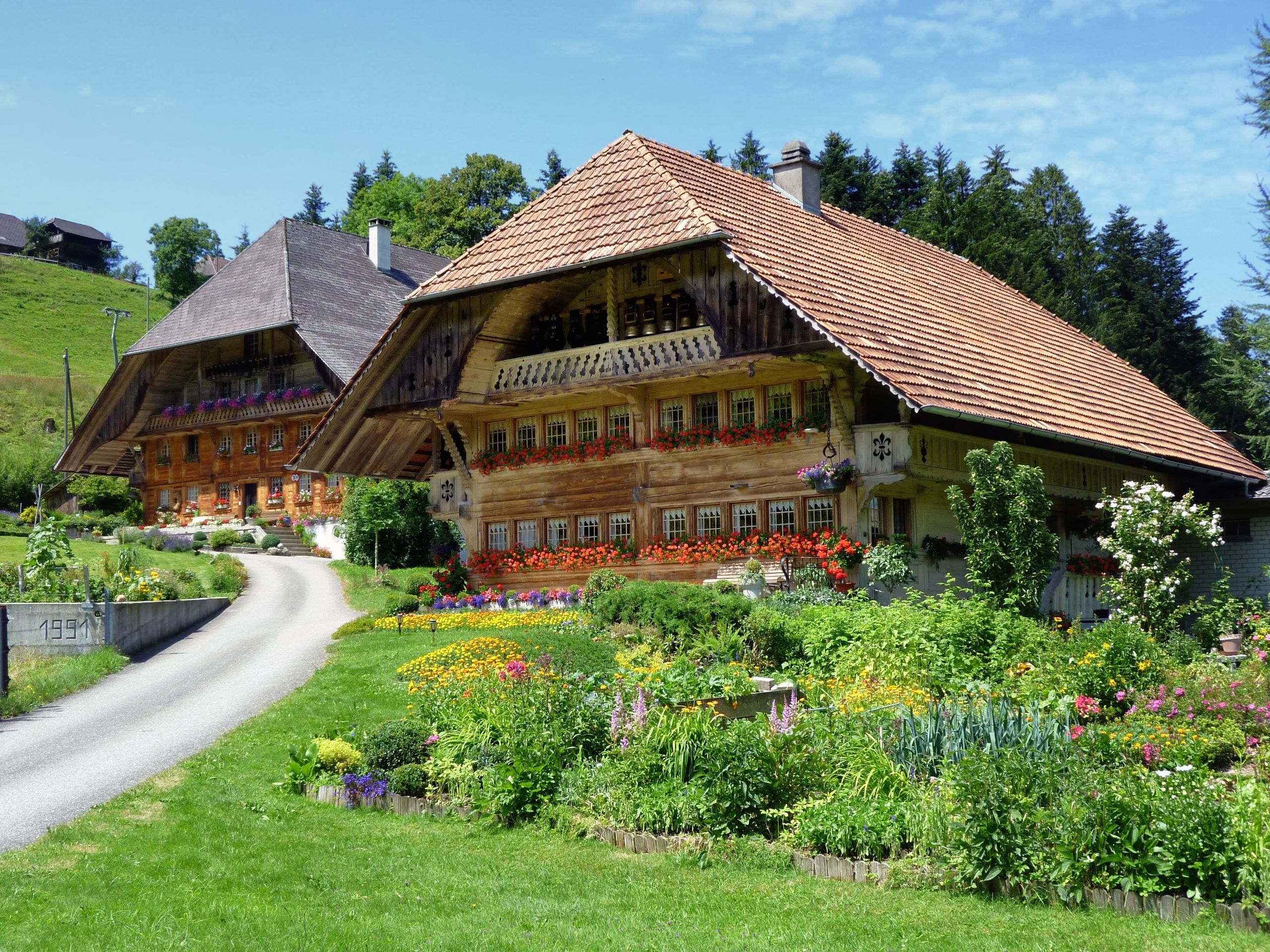 Emmentaler Bauernhof